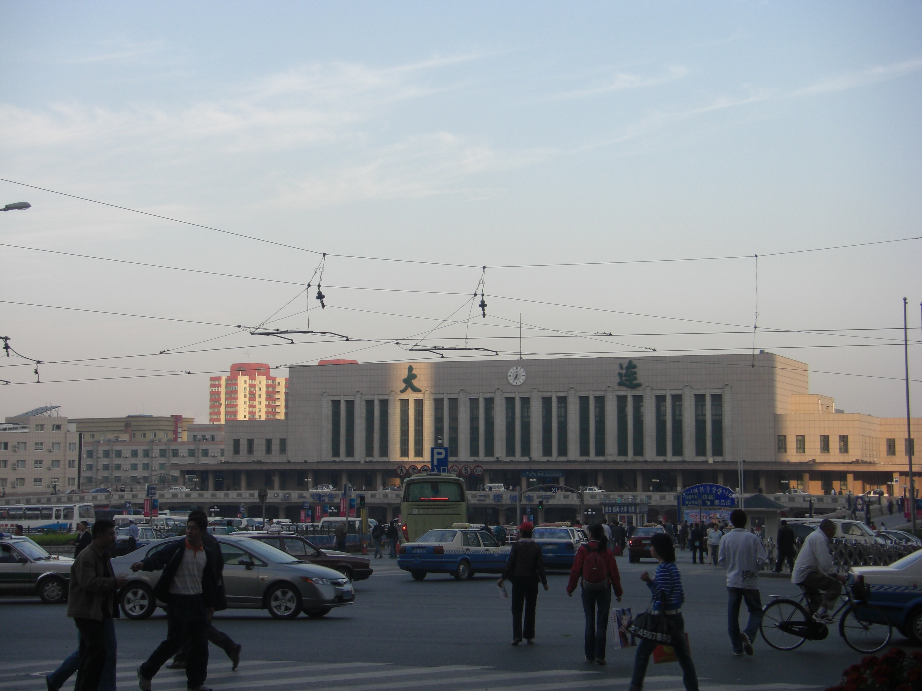 2007年09月30日 朝の大連駅 本人撮影 category:中華人民共和国の画像